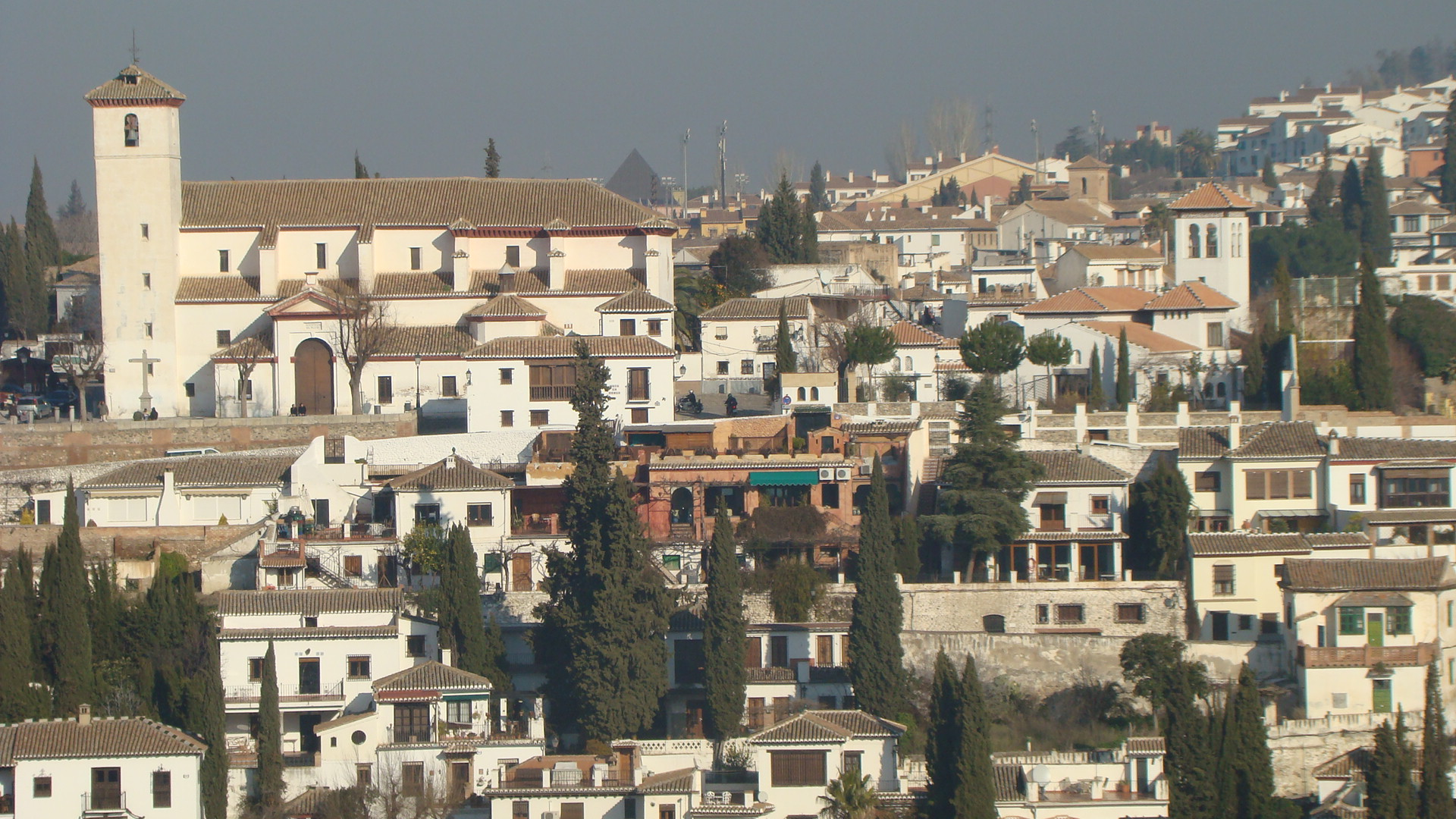 Vista del albaicín alto